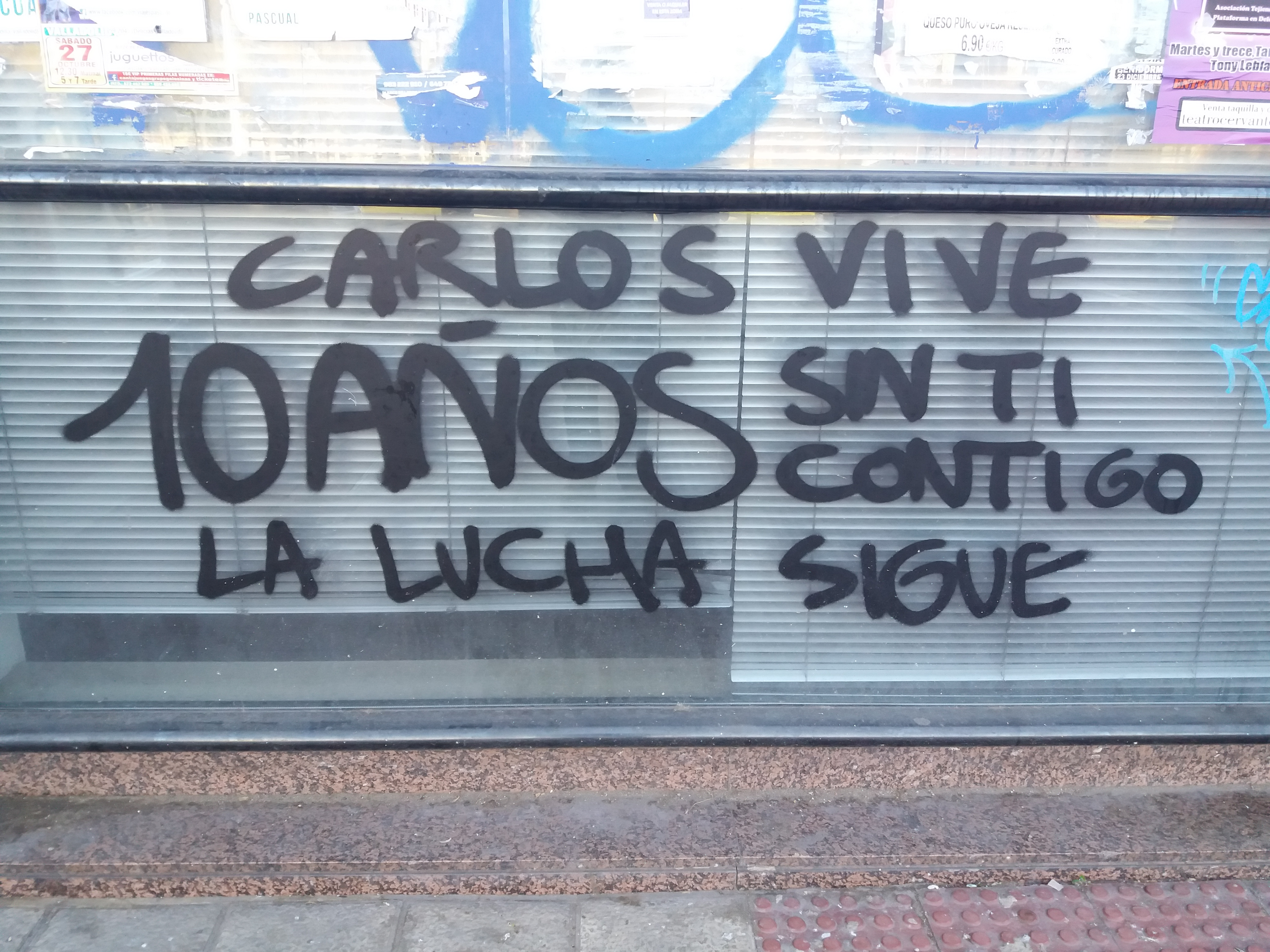 Graffiti en el 10mo aniversario del asesinato de Carlos Palomino